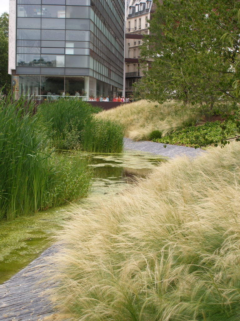 Quai Branly, bassin